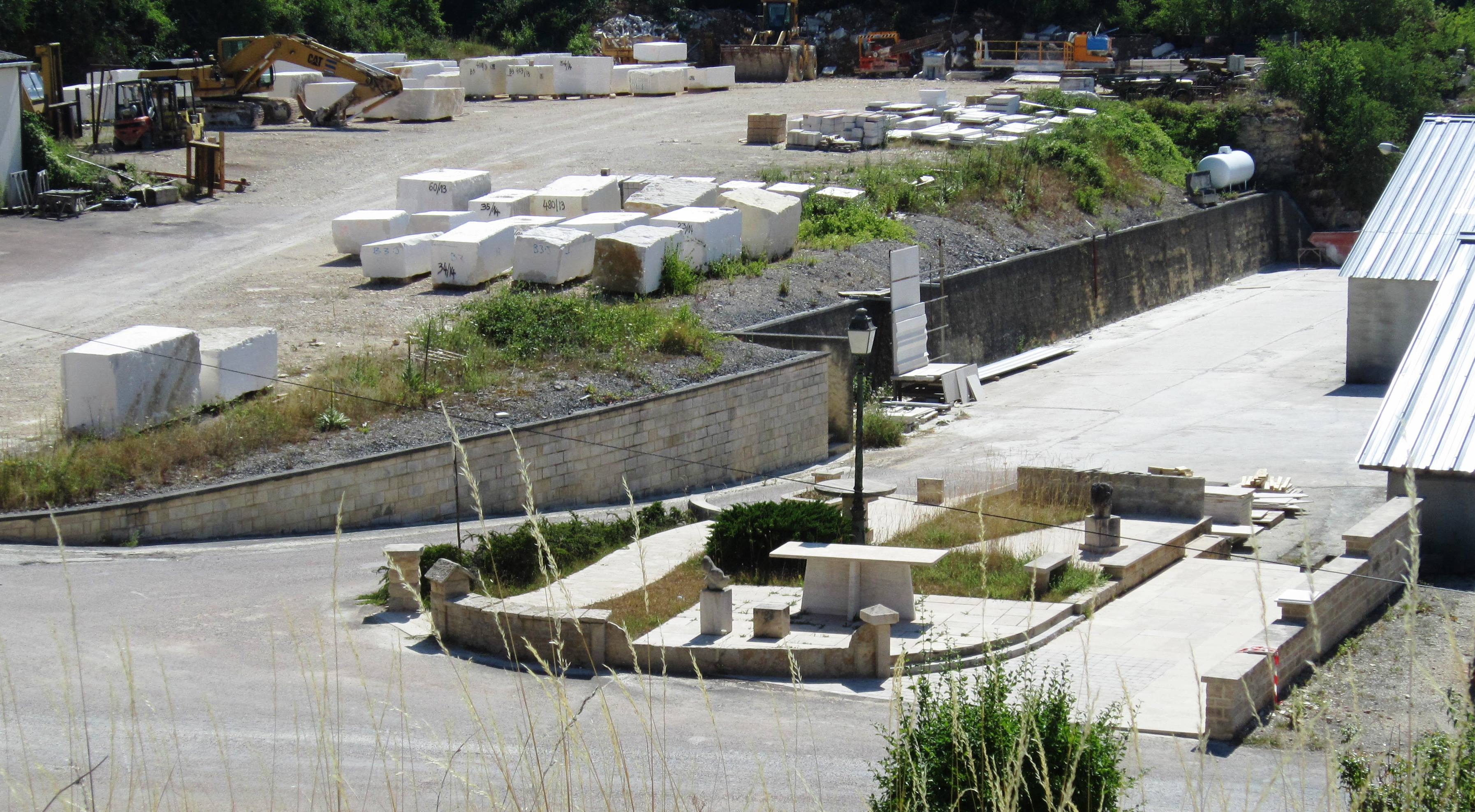 Blocs de pierre bruts à la carrière d'Etrochey (Côte-d'Or)